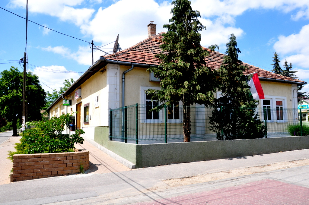 Csekovszky Árpád Művelődési Ház